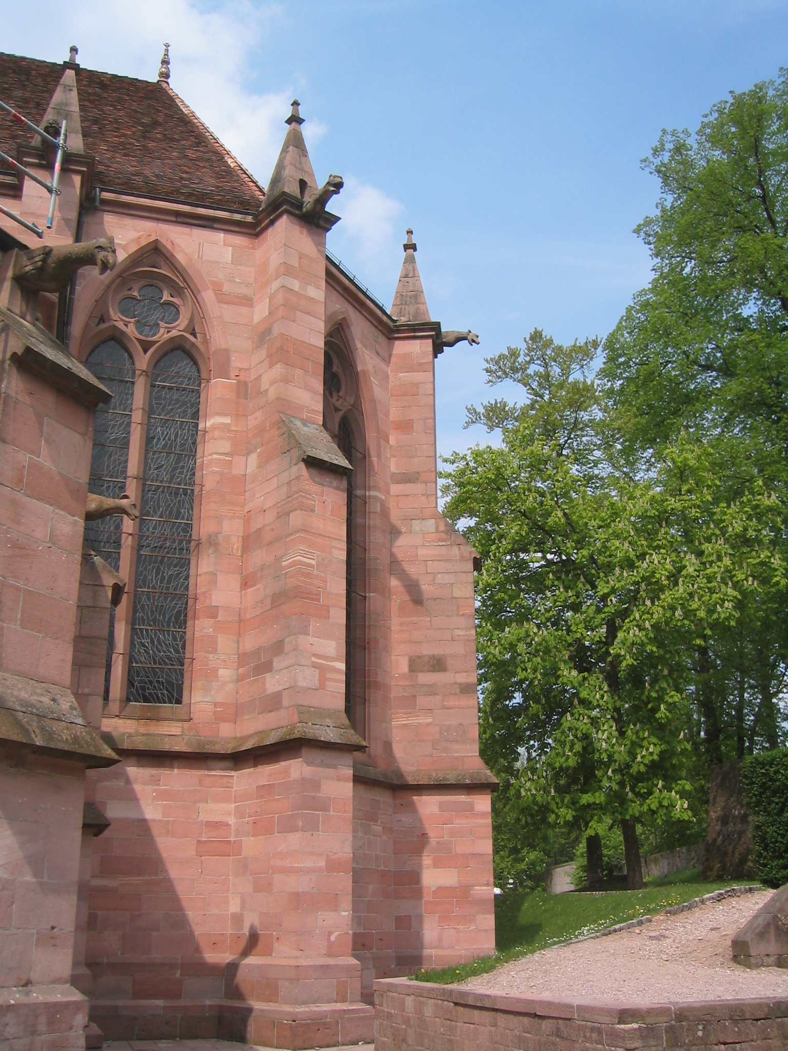 Cathédrale de Saint-Dié-des-Vosges